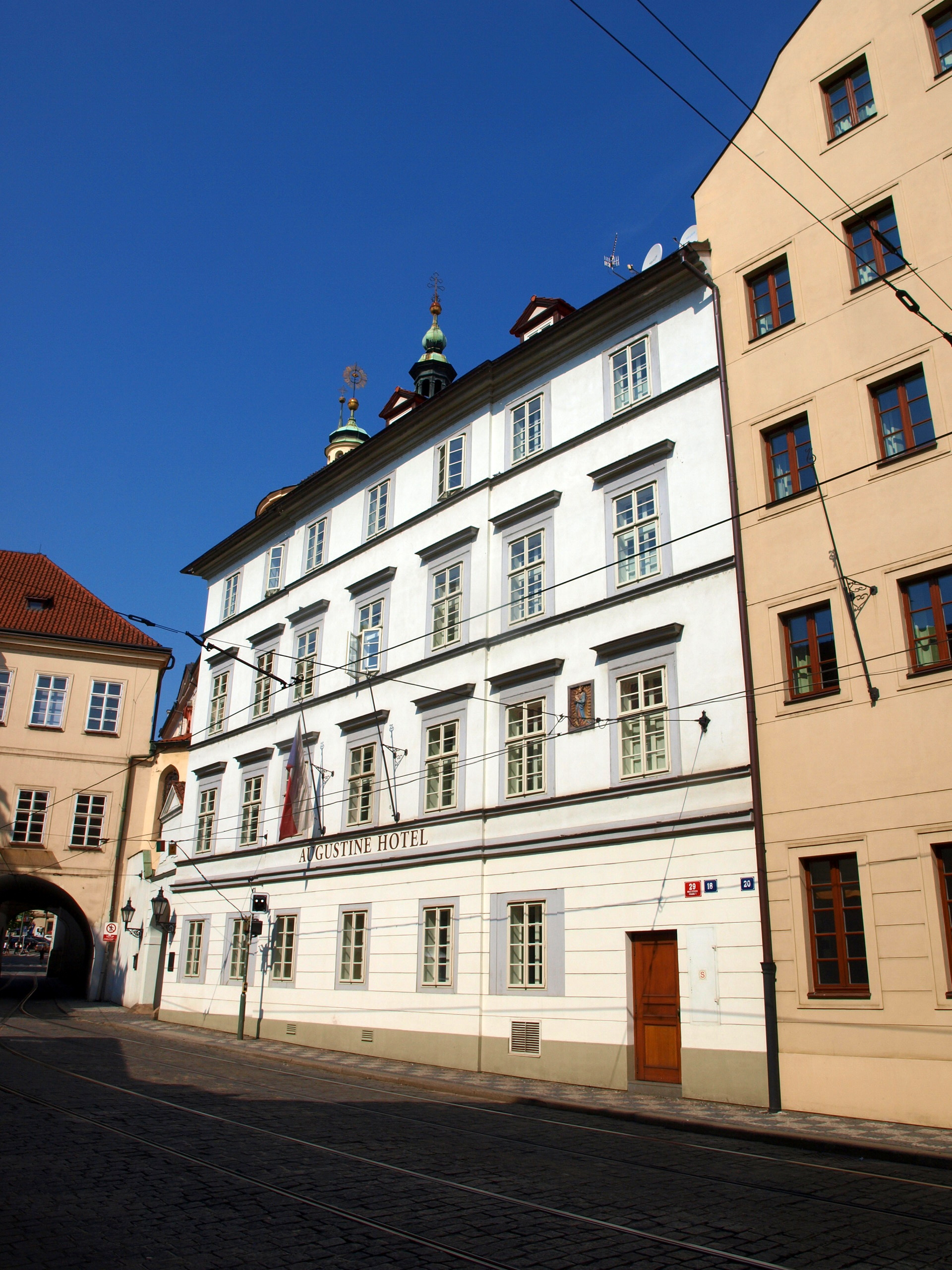 Praha, August. klášter - hotel